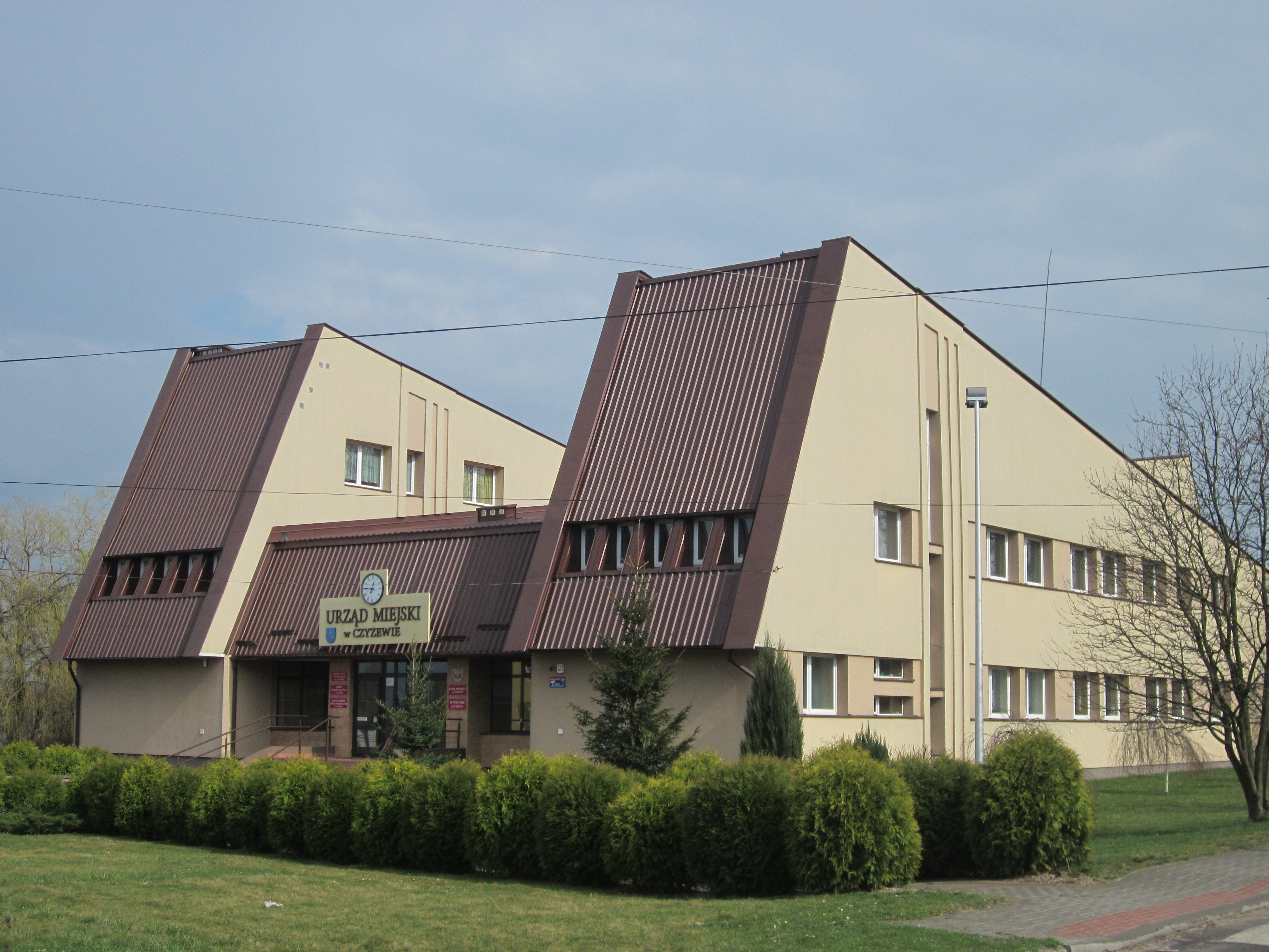 ul. Mazowiecka 34